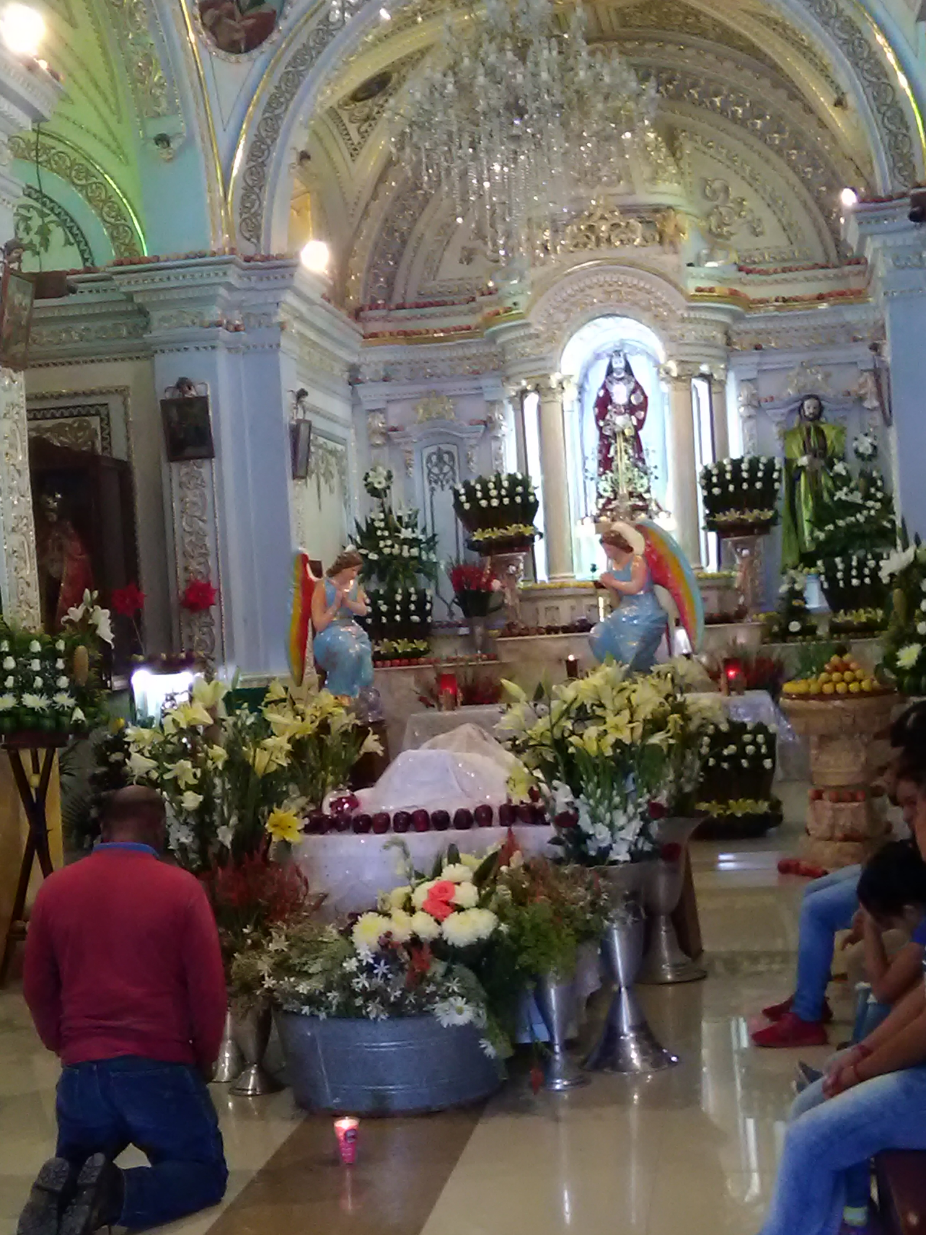 Iglesia de Jesus Tepactepec en Natívitas, Tlaxcala